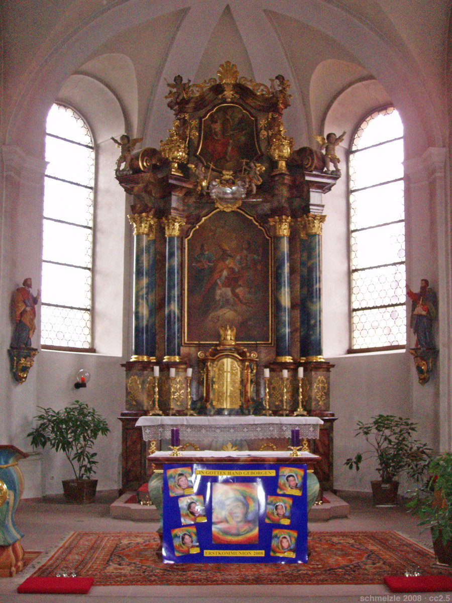 Hochaltar der Kirche St. Kilian in Bad Friedrichshall-Duttenberg